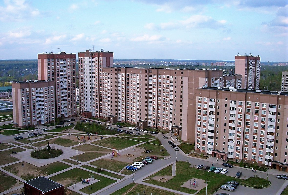 Микрорайон Новый городок (Нахабино). Первая очередь. Турецкие дома. Фотография сделана в 2005 году.